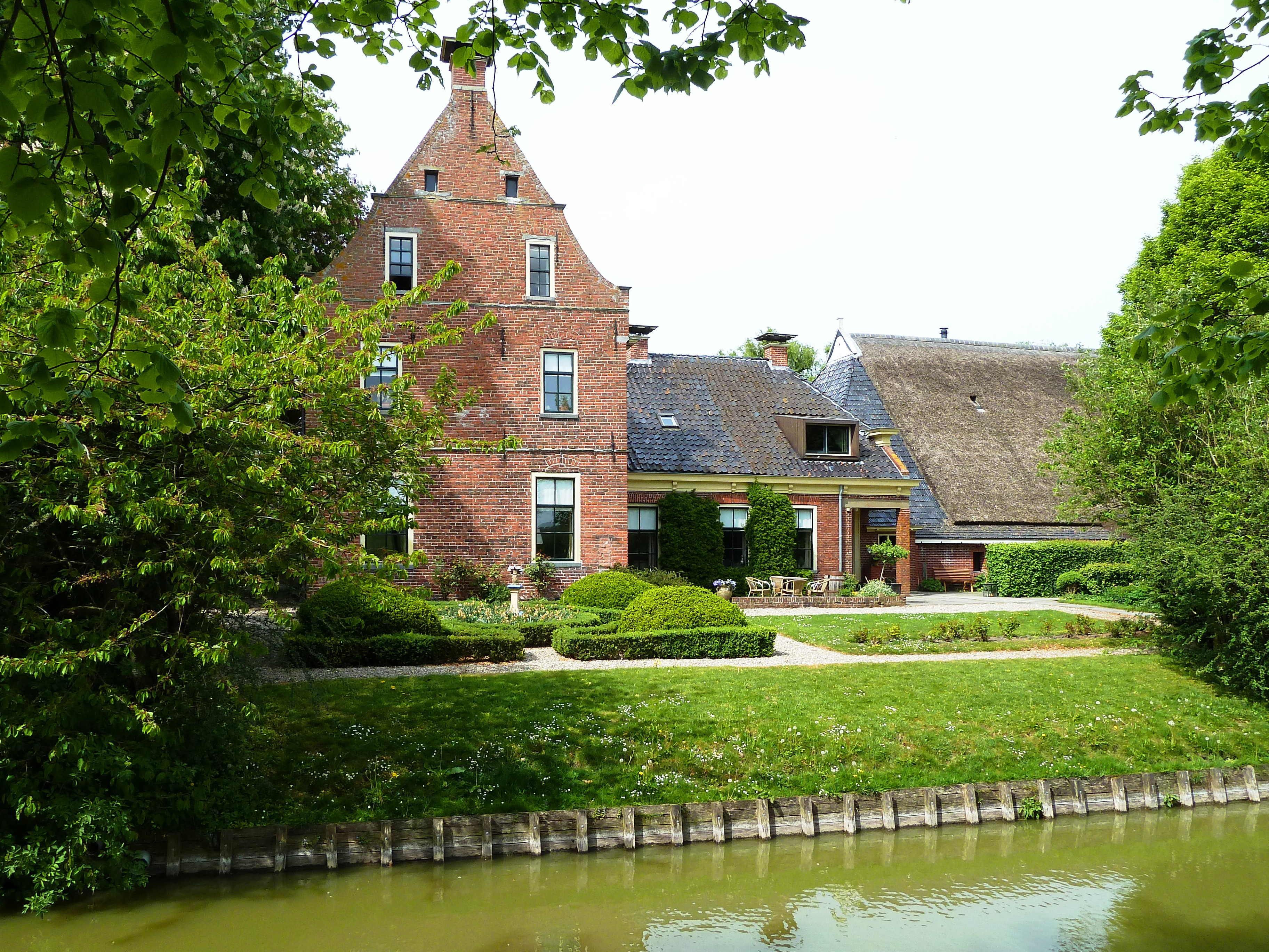 Zijaanzicht van de Piloersemaborg (Groningen, Nederland).